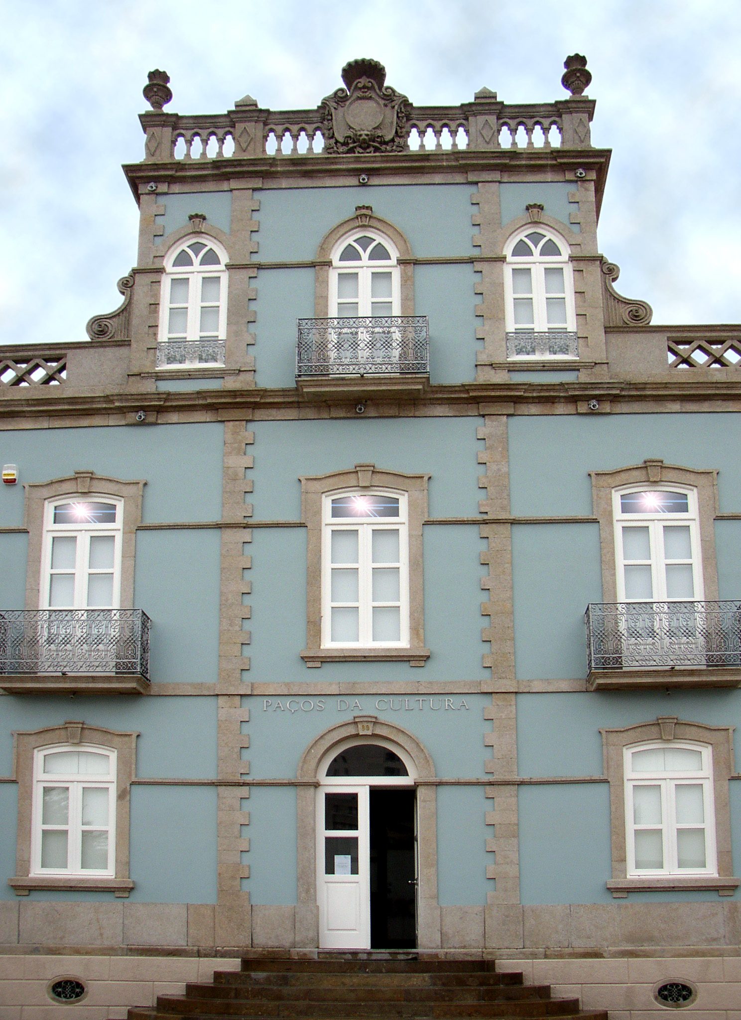 Antigo Paços de Concelho This file was uploaded for Wiki Loves Monuments in Portugal with the unique identifier 97029879.